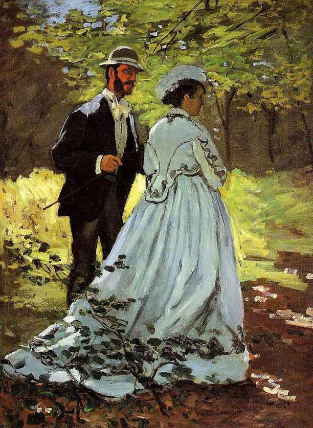 Les promeneurs